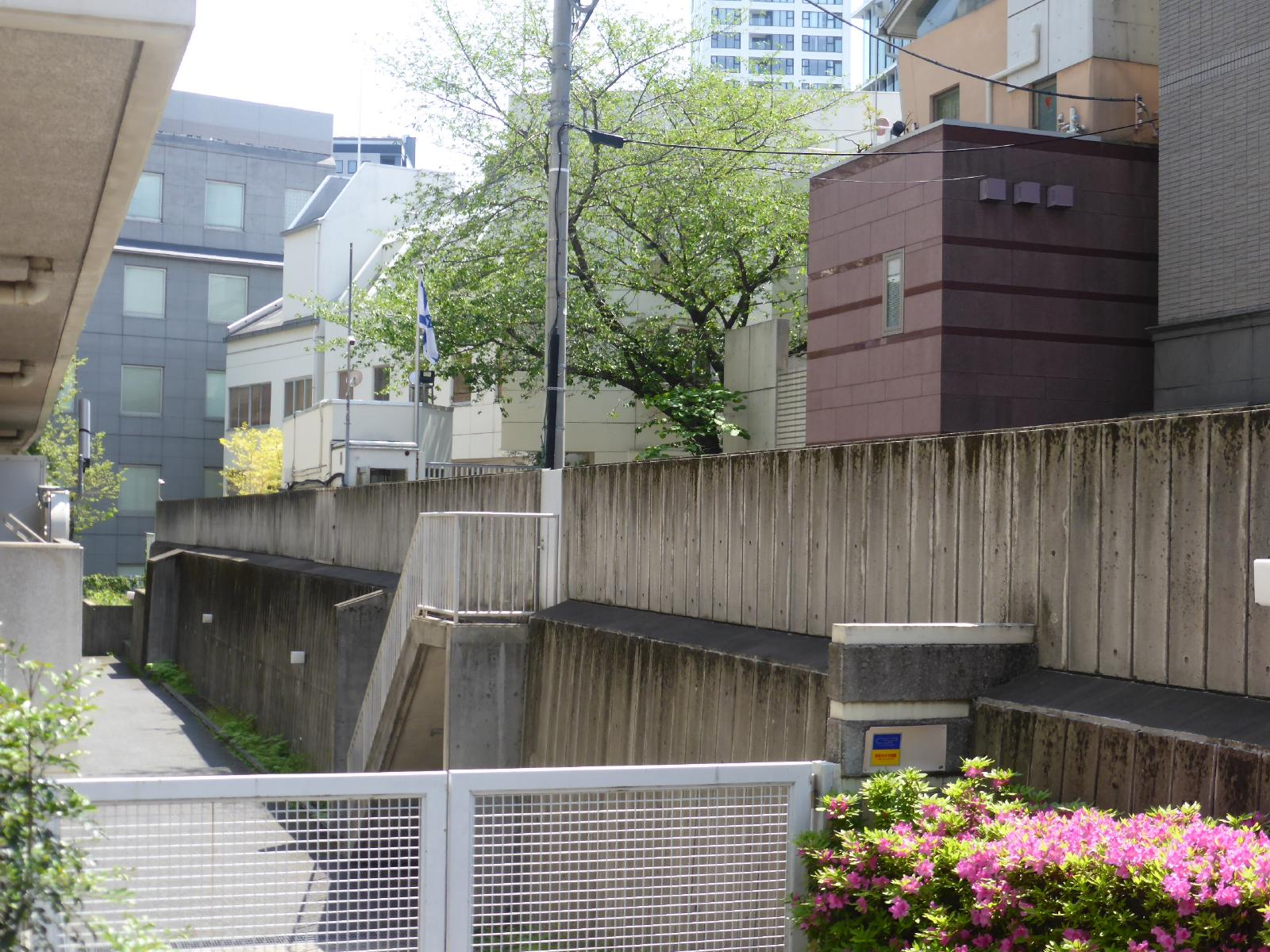 イスラエル大使館は白い建物